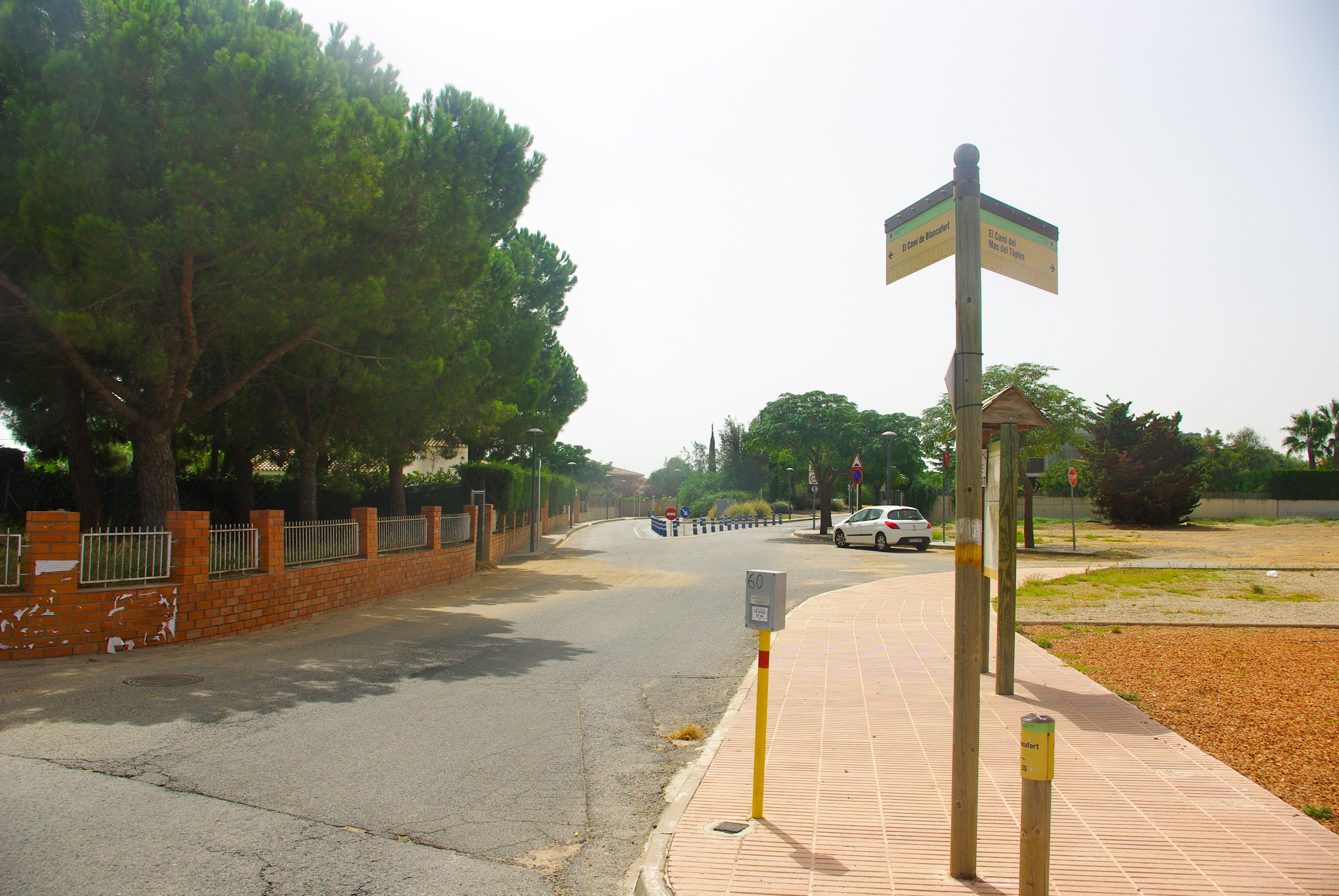 Camí de Blancafort